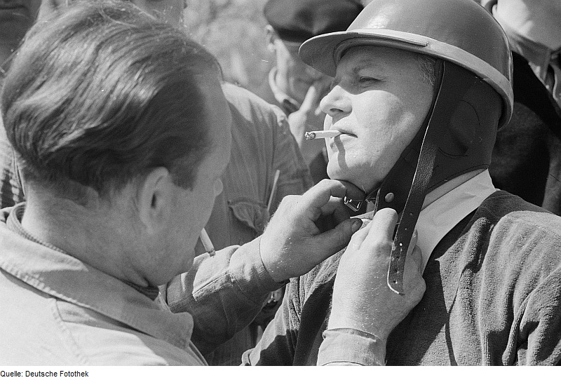 Original image description from the Deutsche Fotothek Portrait des rauchenden Arthur Rosenhammers beim 6. Leipziger Stadtparkrennen